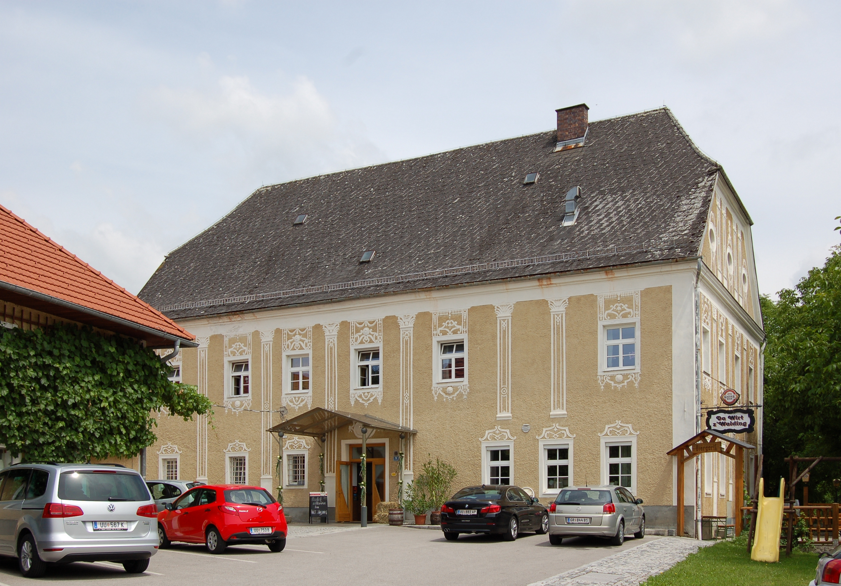 Wohnhaus, ehem. Gasthaus Pöltl, ehem. Eschelberg'sches Pflegeamt und heutiger Wirt z' Walding in Walding (Oberösterreich).